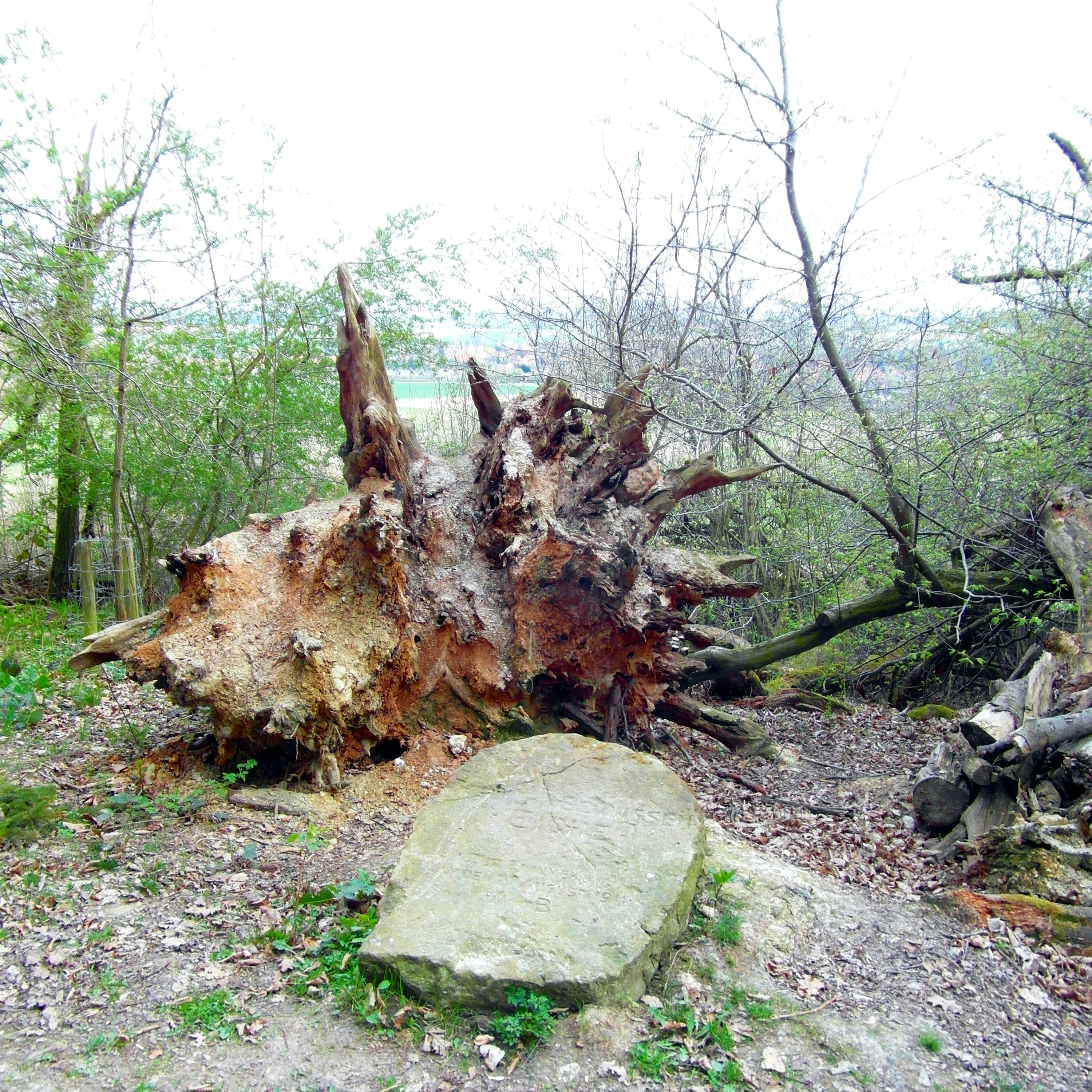 Die Rudolf-von-Bennigsen-Eiche war ein Naturdenkmal (ND-H 147) im Gebiet des Stadtteils Bennigsen der Stadt Springe in der Region Hannover in Niedersachsen. Der Denkmalschutz wurde 2007 durch Verordnung aufgehoben. Der Baum wurde Ende Januar 2013 bei einem Sturm vom Blitz getroffen, stürzte um und zerbrach. Landschaftsschutzgebiet Süd-Deister, LSG H 30, (Niedersachsen, Deutschland).